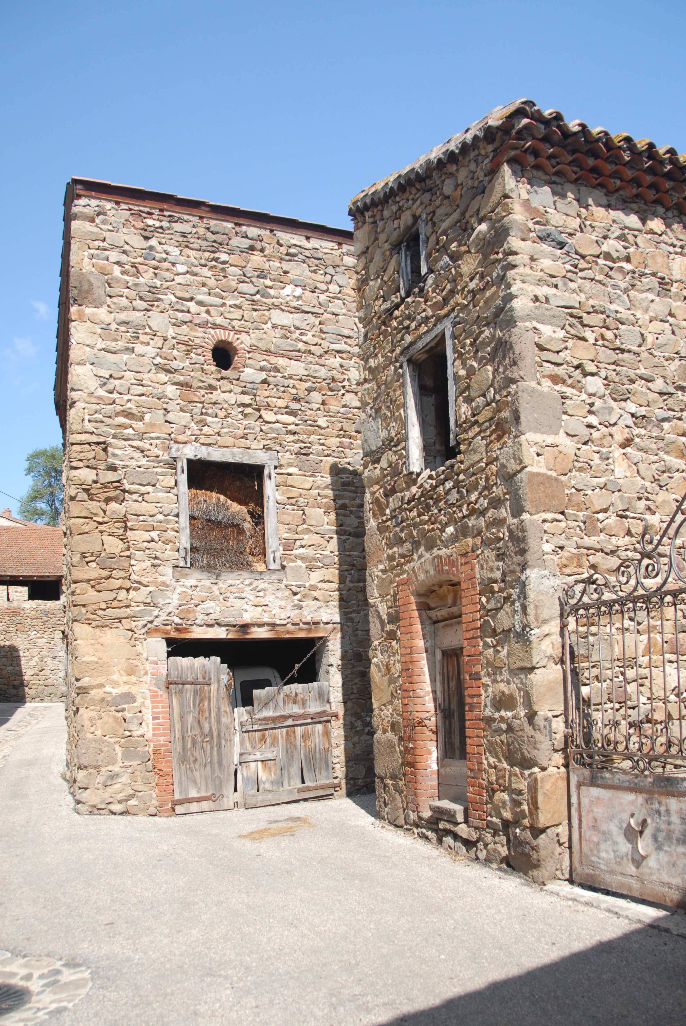 Lavaudieu, Wohnhaus und Remise im Zentrum